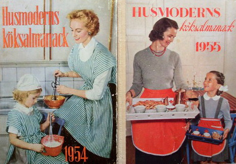 Husmoderns köksalmanack från 1954 och 1955